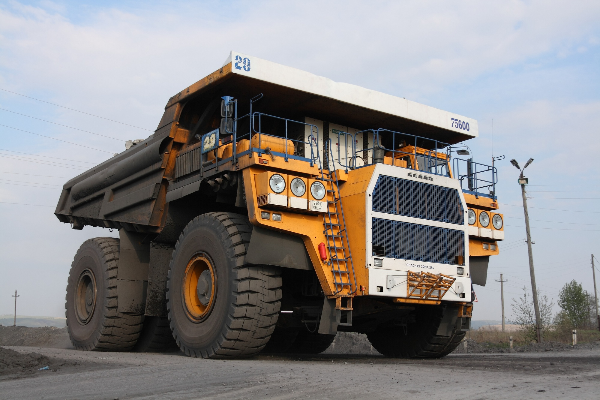 БелАЗ 75600 на Бачатском угольном разрезе, Кемеровская область.